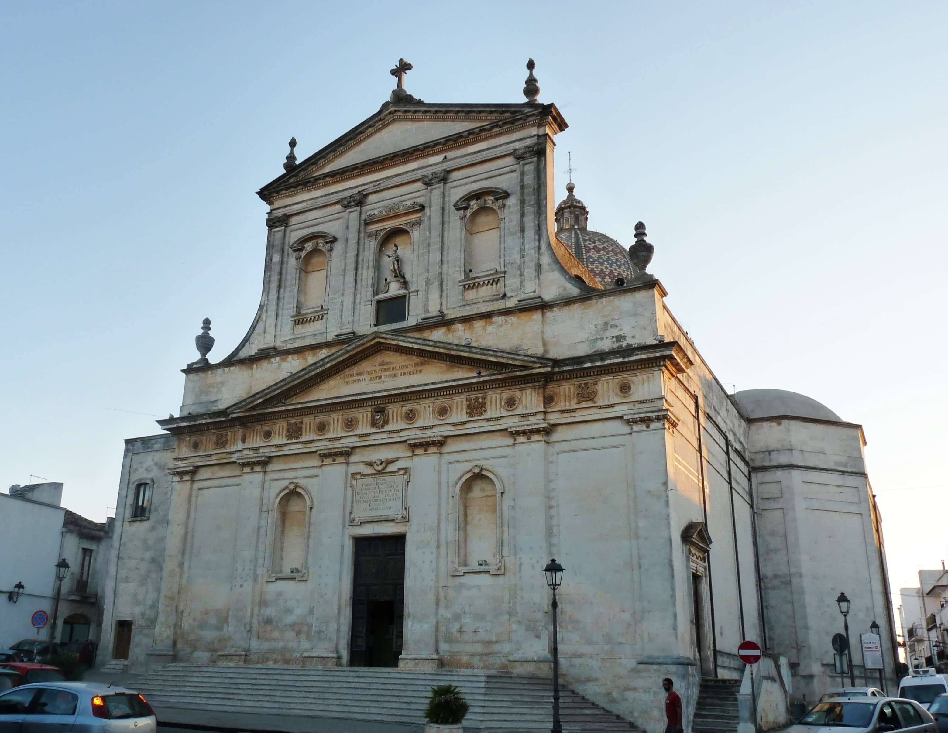 La Chiesa di San Rocco è stata costruita nel corso del XIX secolo su progetto dell'ing. Antonio Guariglia di Lecce dove in precedenza sorgeva una cappella. E' una parrocchia dal 1855.